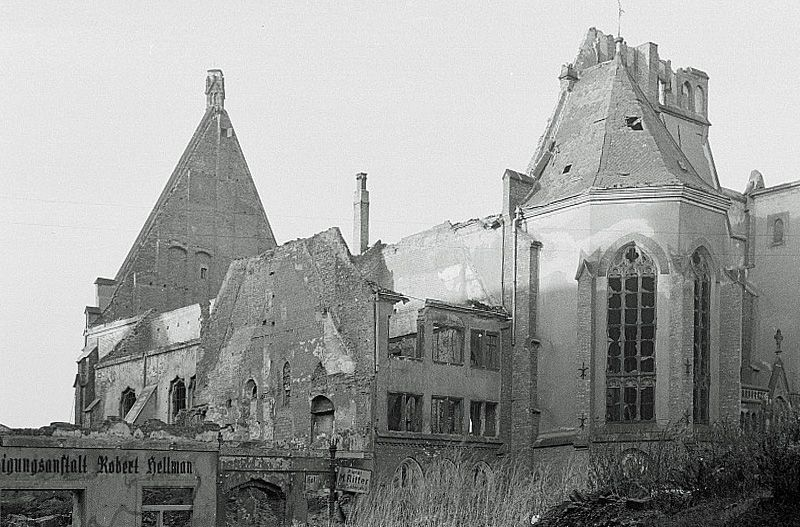 Original image description from the Deutsche FotothekRuine der Matthäikirche